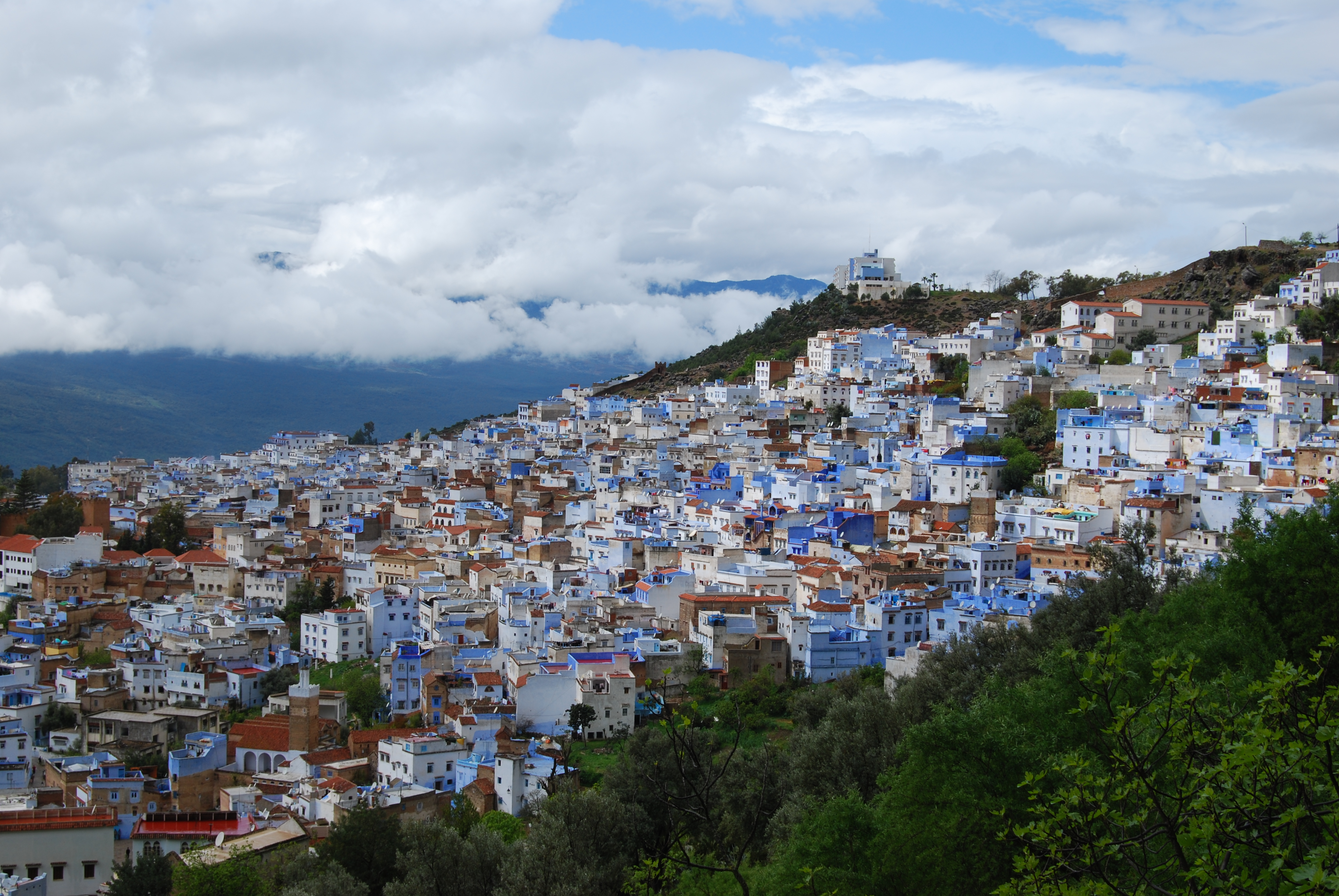 Vista de Xauen (Marruecos) en 2008